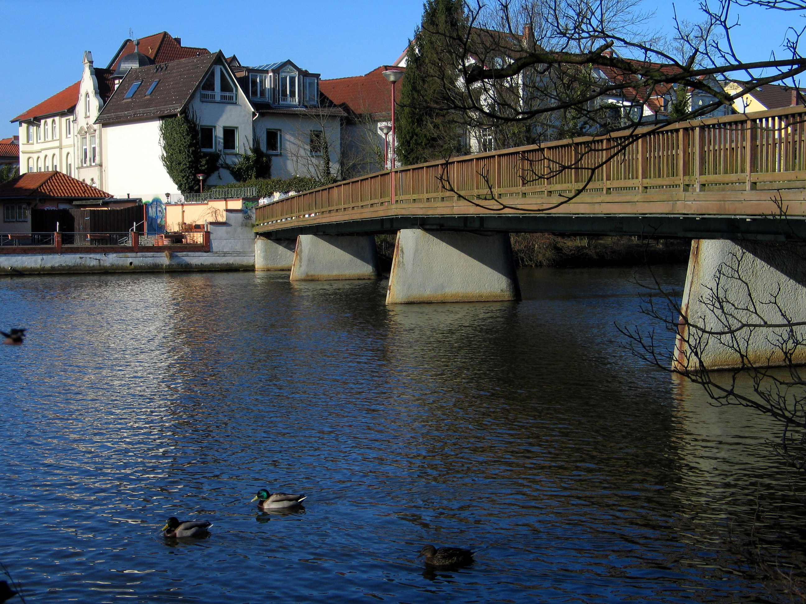 Noch zu beschreibendes und zu kategorisierendes Foto aus Celle ...